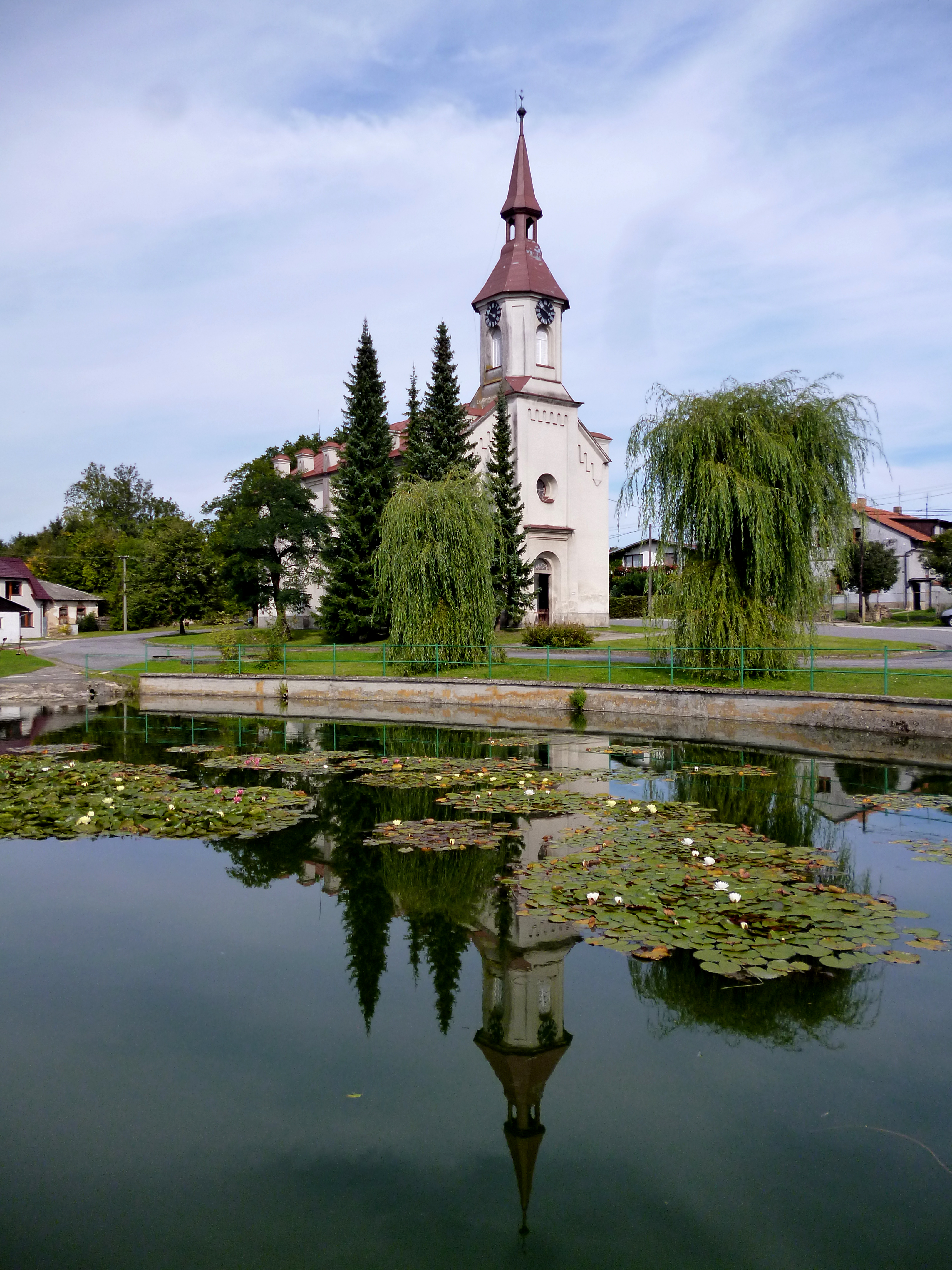 Opatov kostel